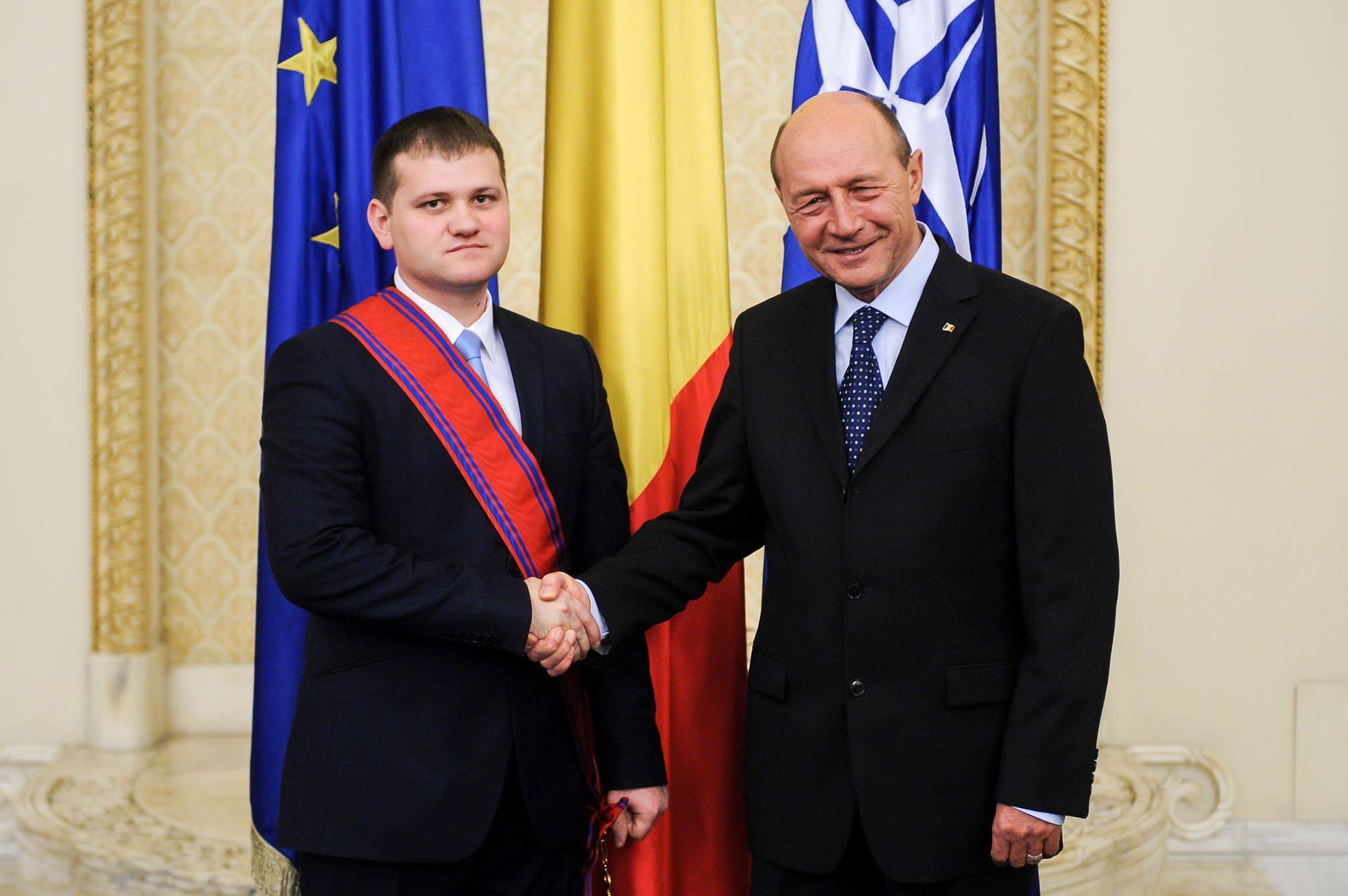 V. Munteanu primește ordinul „Steaua României” în grade de Mare Cruce